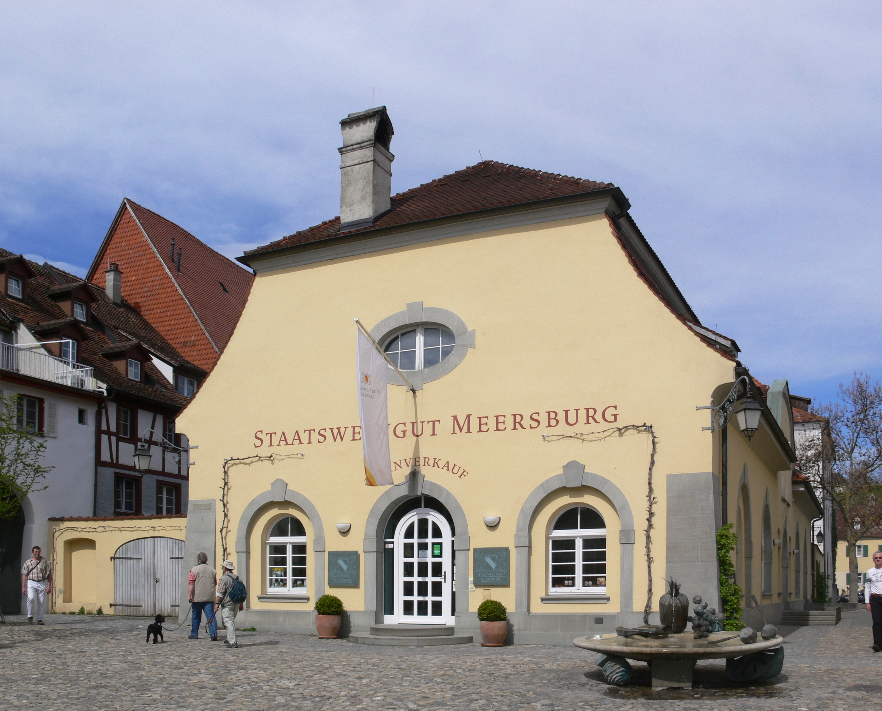 Meersburg, Bodenseekreis, Staatsweingut, Weinverkauf zwischen Neuem Schloß und dem ehem. Reit- und Stallhof; rechts Früchteteller von Elisabeth Wagner, 1992 (aufgestellt 1994)